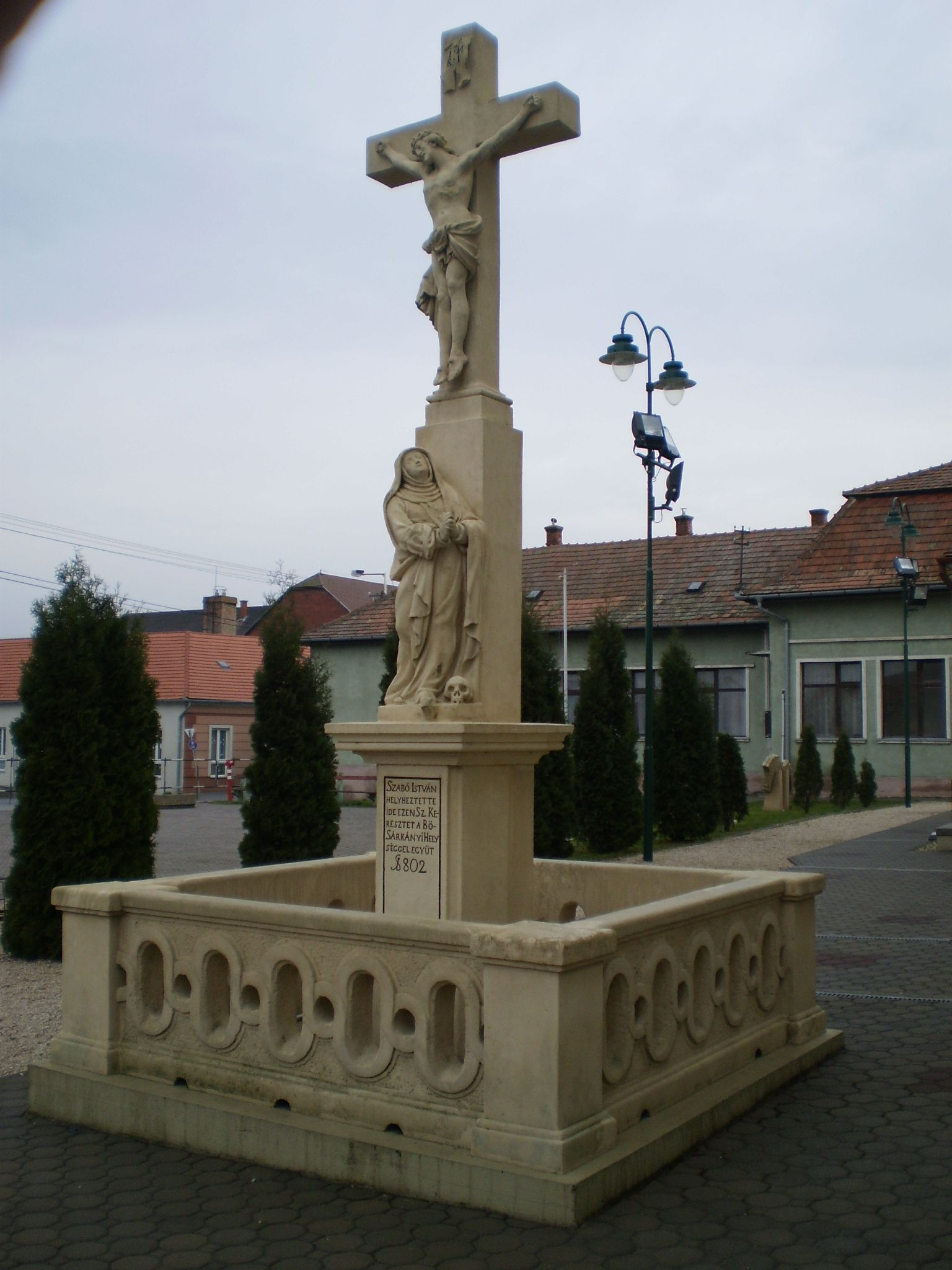 Bősárkányi feszület. Kőkereszt, klasszicista, 1802. azonosító: 4012, törzsszám: 3473 (Győr-Moson-Sopron megye) This is a photo of a monument in Hungary. Identifier: 4012